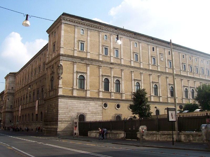 Roma - Palazzo della Cancelleria